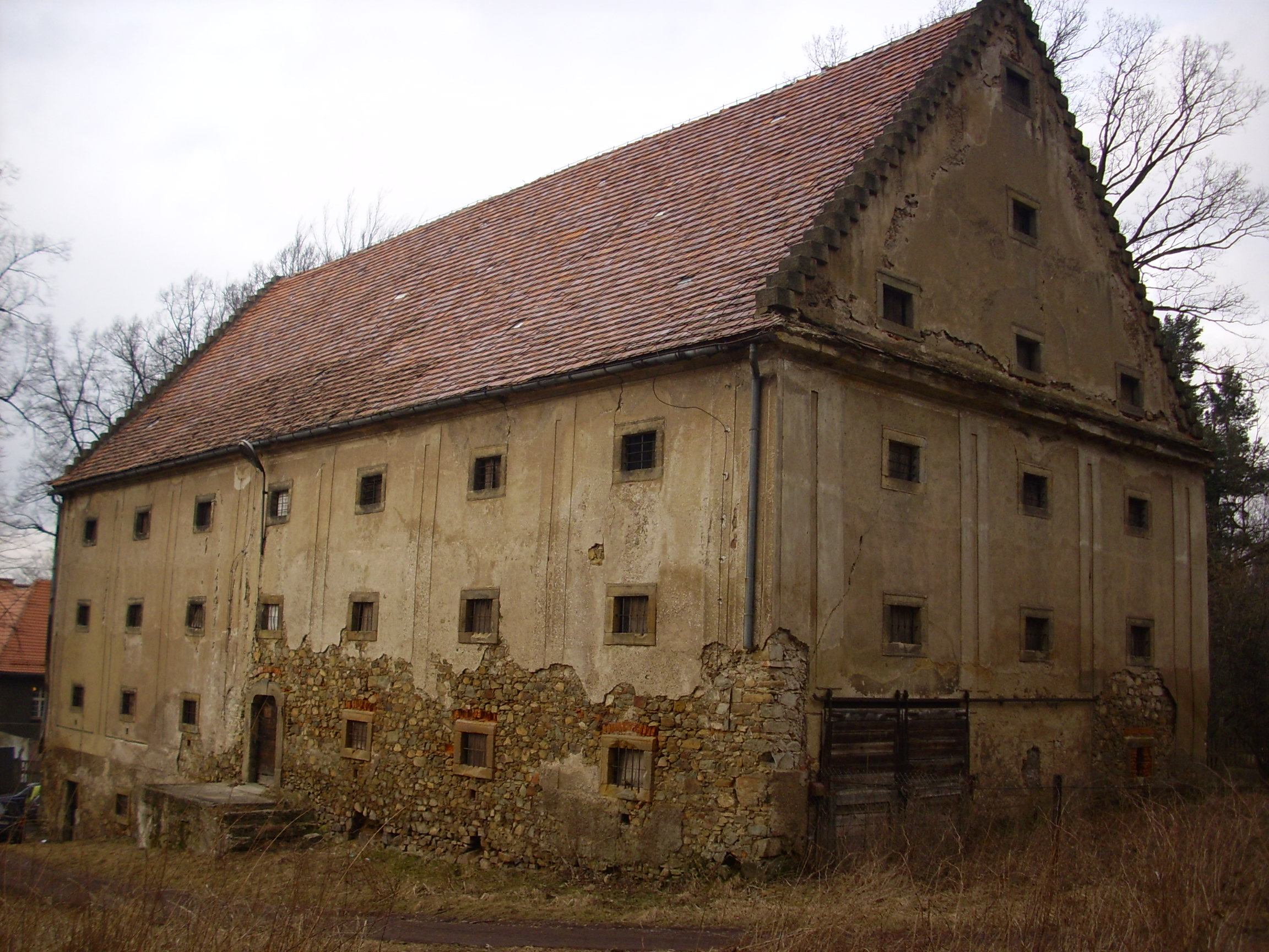 Czarny Bór. Pochodzący z XVIII wieku spichlerz pałacowy.